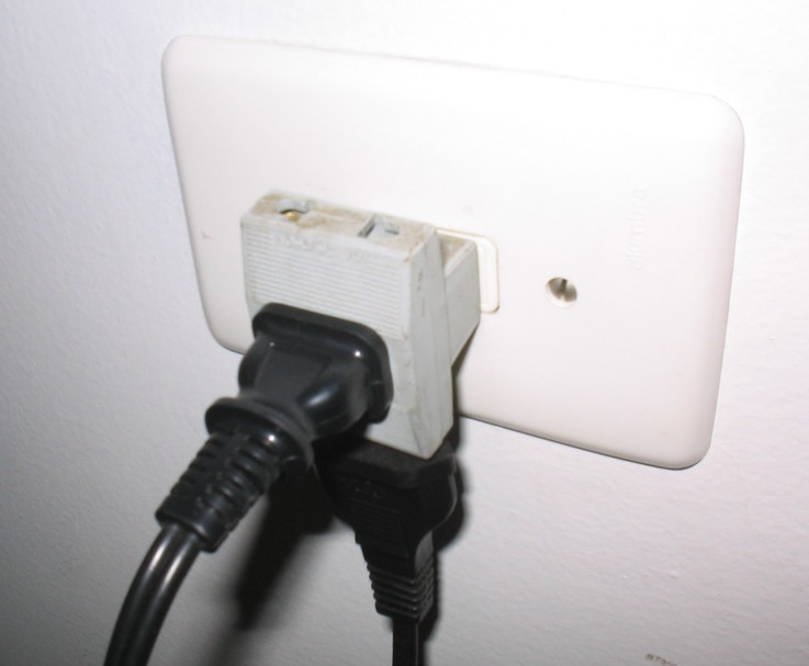 Um velho benjamim (ou T, tê)